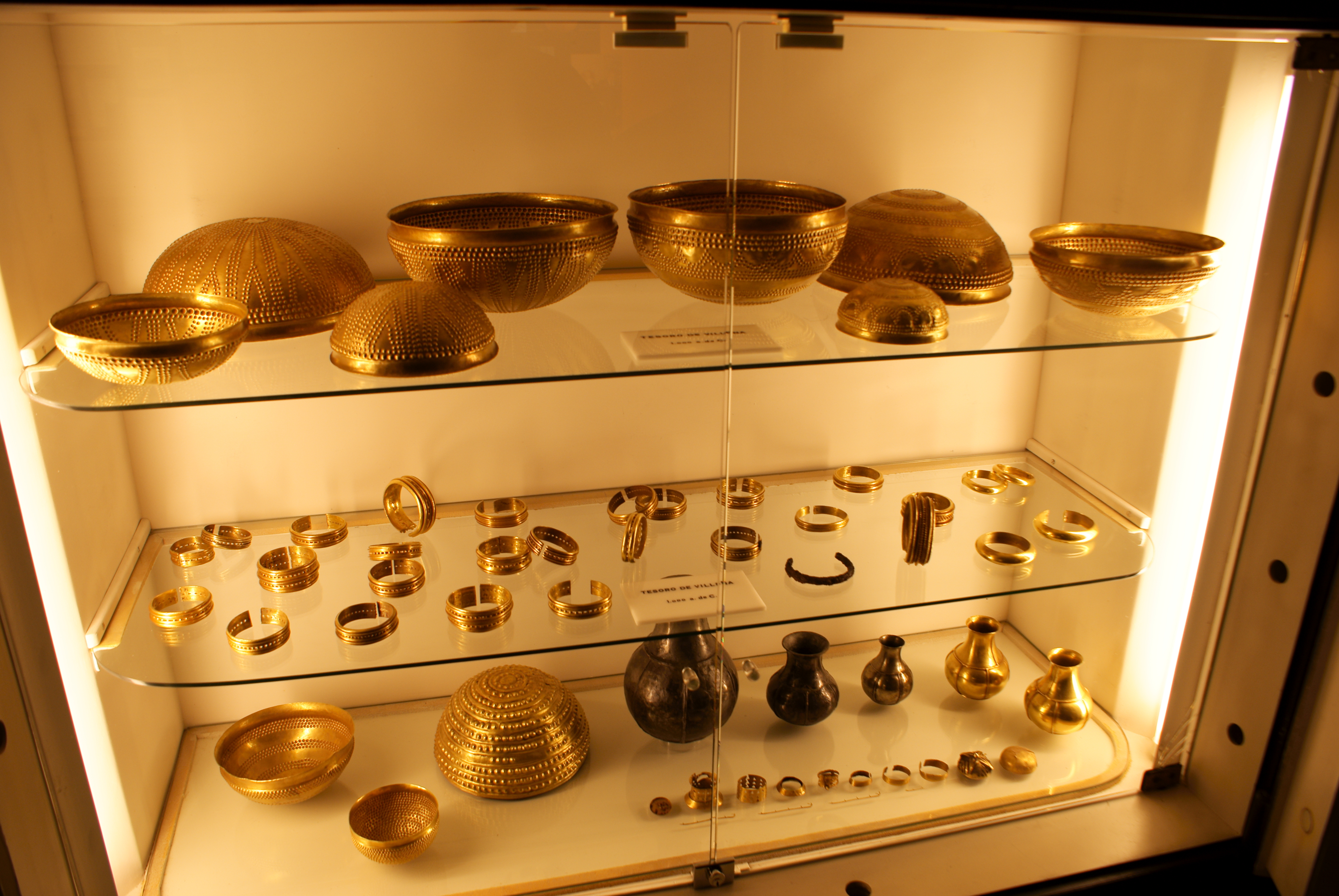 Tesoro de Villena, España. Museo Arqueológico Municipal de Villena. 2010.